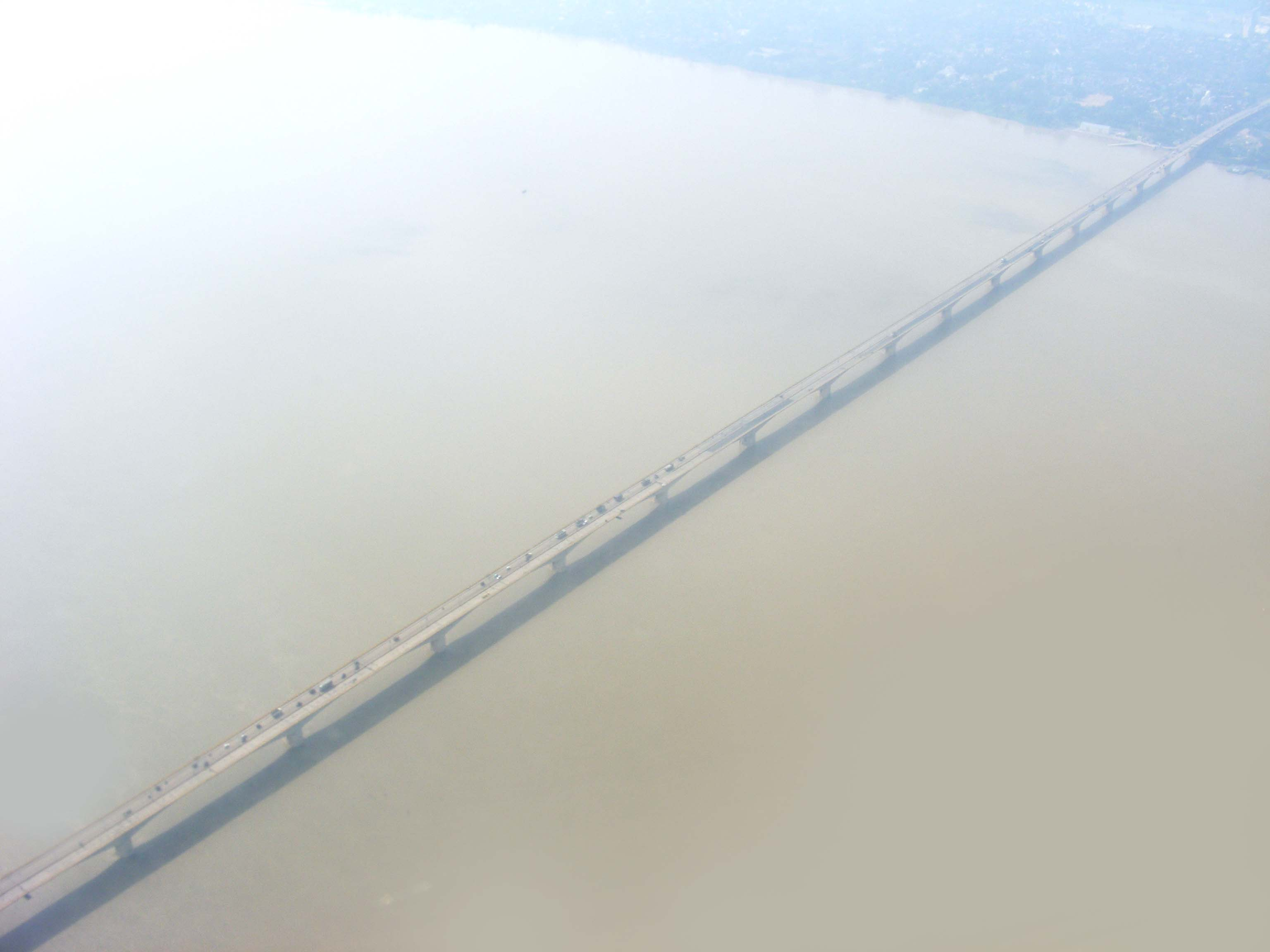 Mahatma Gandhi Setu, aerial view